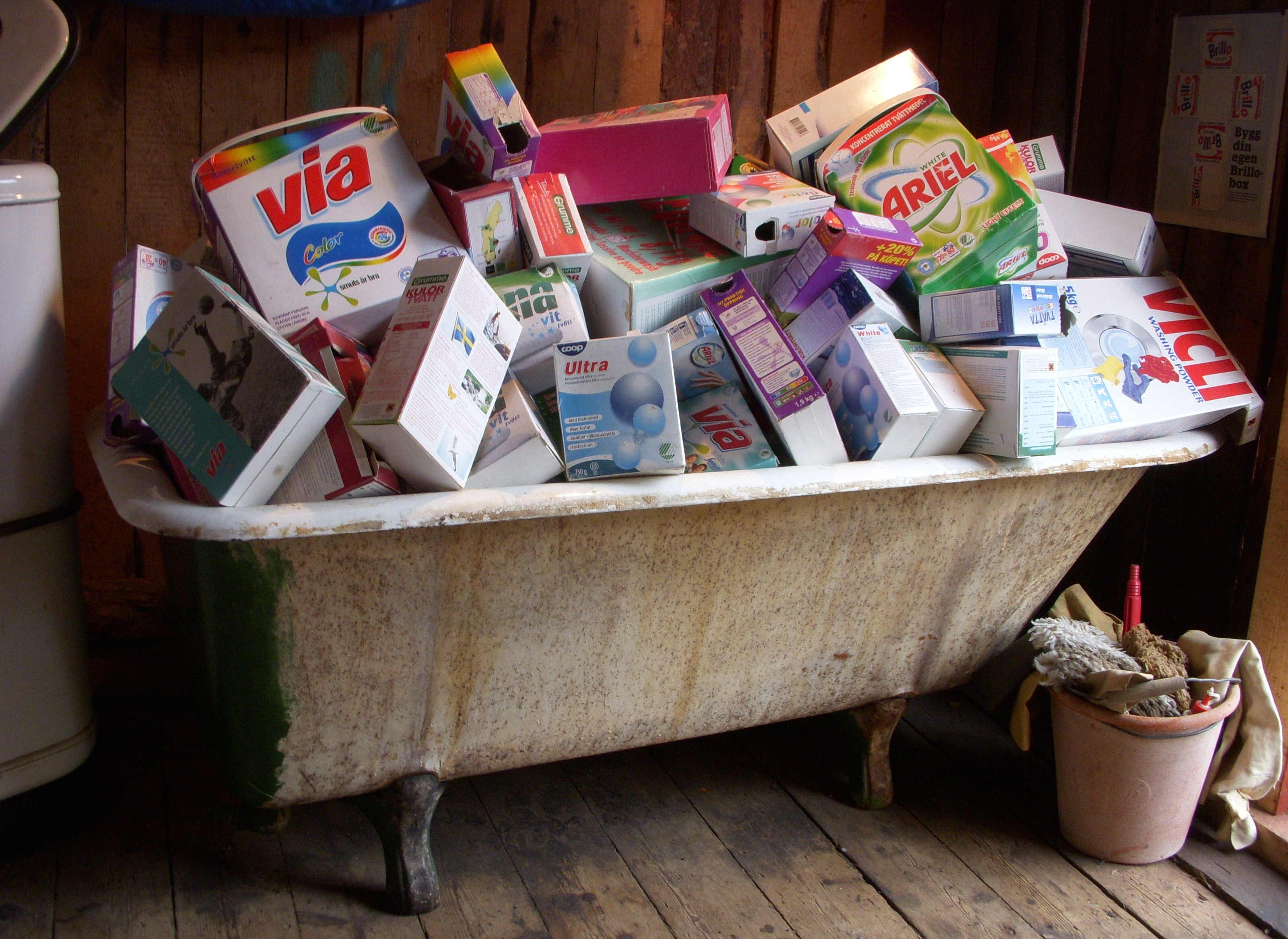 Hagalunds Tvätterimuseum i Huddinge